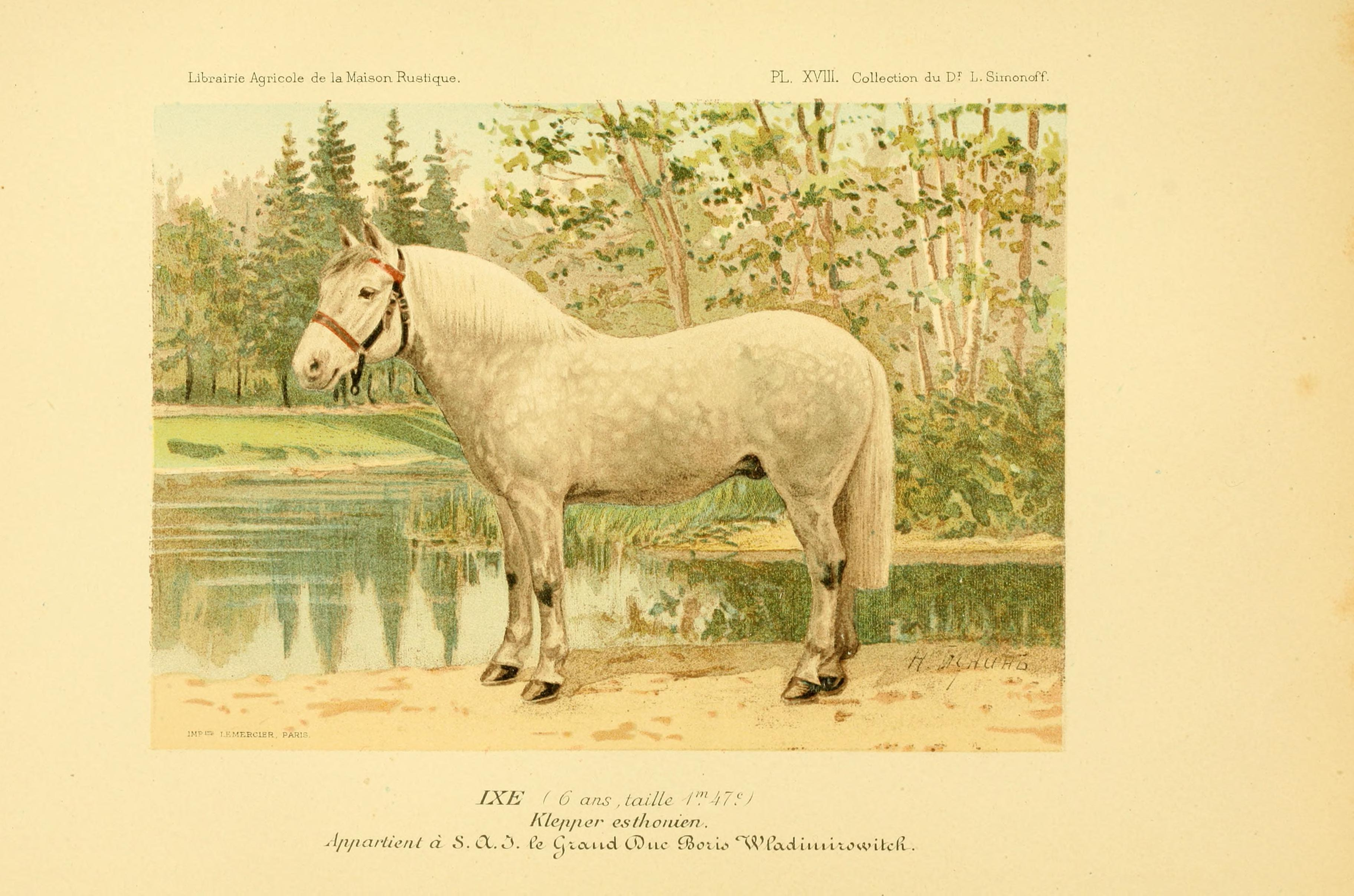 Les races chevalines : avec une étude spéciale sur les chevaux russes /